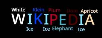 Hình ảnh một bạch cầu ái kiềm